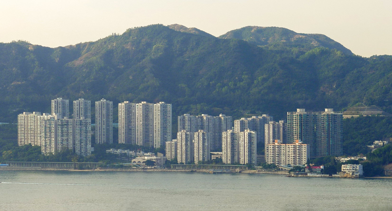 Tsing Lung Tau